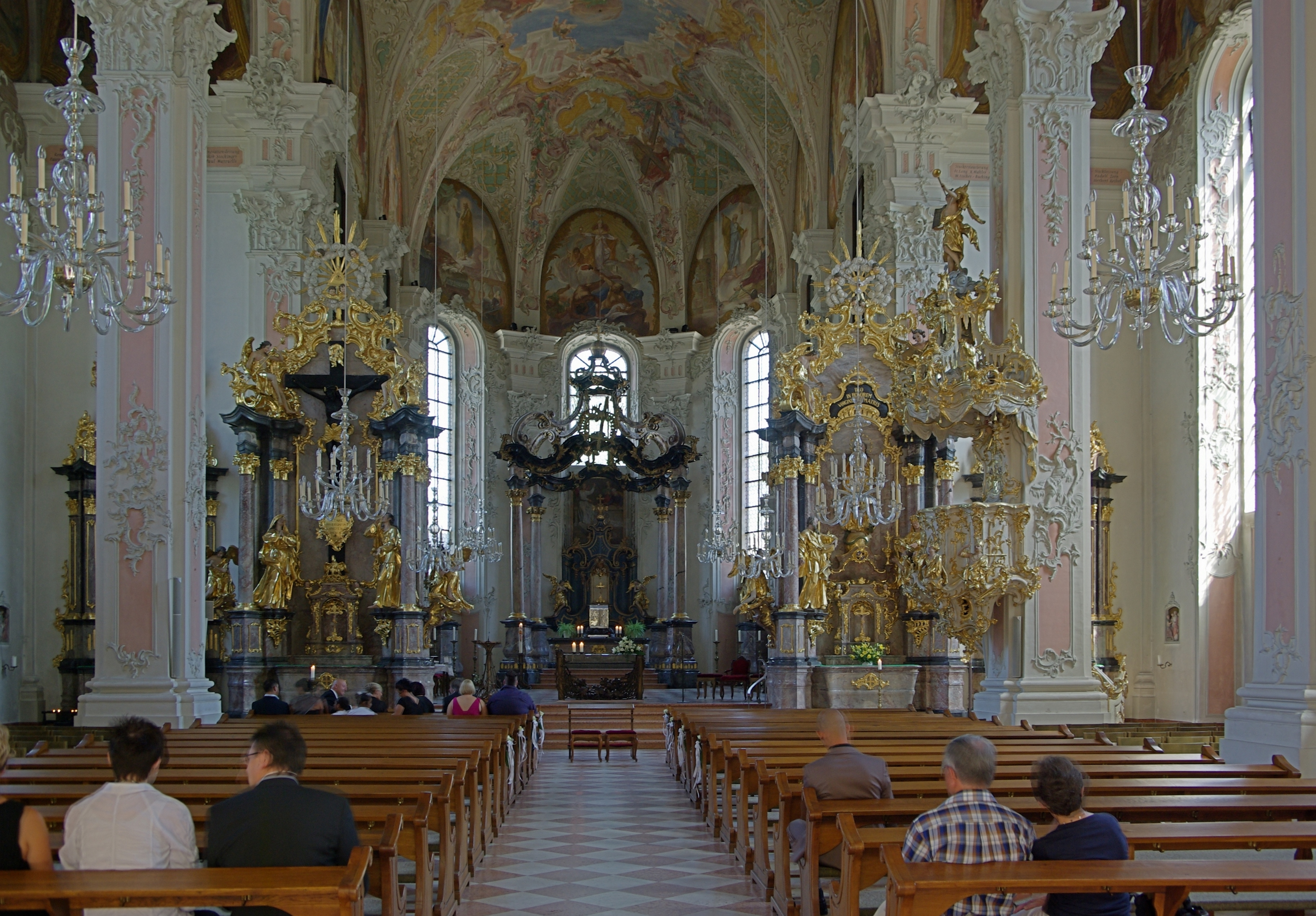 Mainz, St. Peter